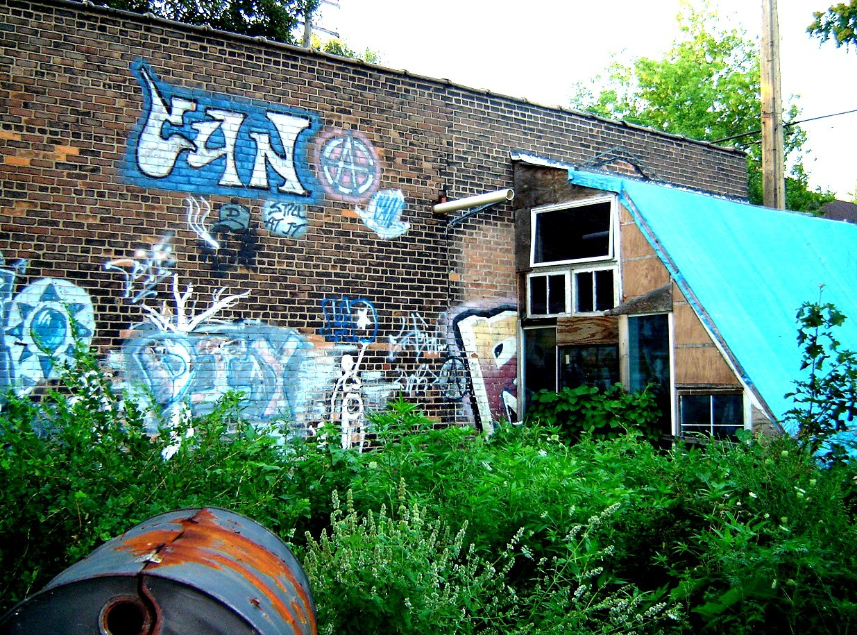 Trumbullplex, Detroit, Summer 2006